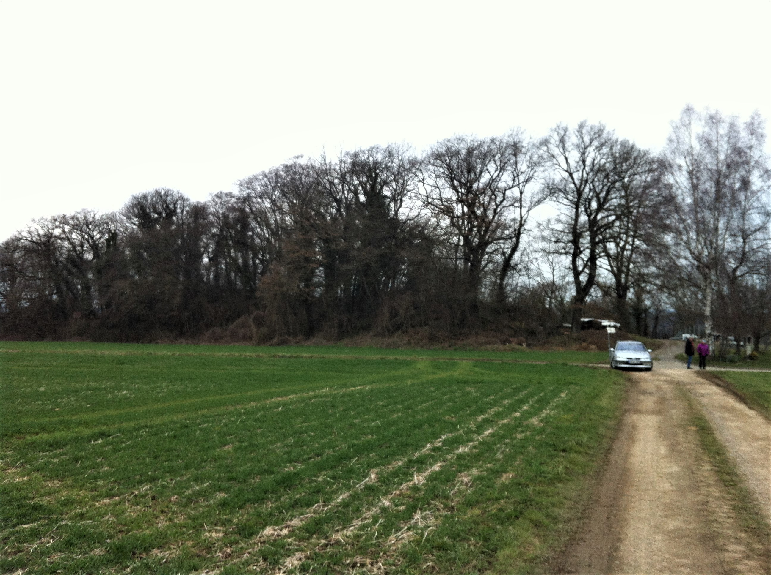 Der Galgenbuck östlich von Oberlauchringen, Gemeinde Lauchringen im Landkreis Waldshut in Baden-Württemberg. Mittelalterliche Hinrichtungsstätte. Frühgeschichtliche Funde im Umfeld. Mehrere Felserhebungen aus Nagelfluh. Ansicht der bewaldeten Anhöhe von Süden.